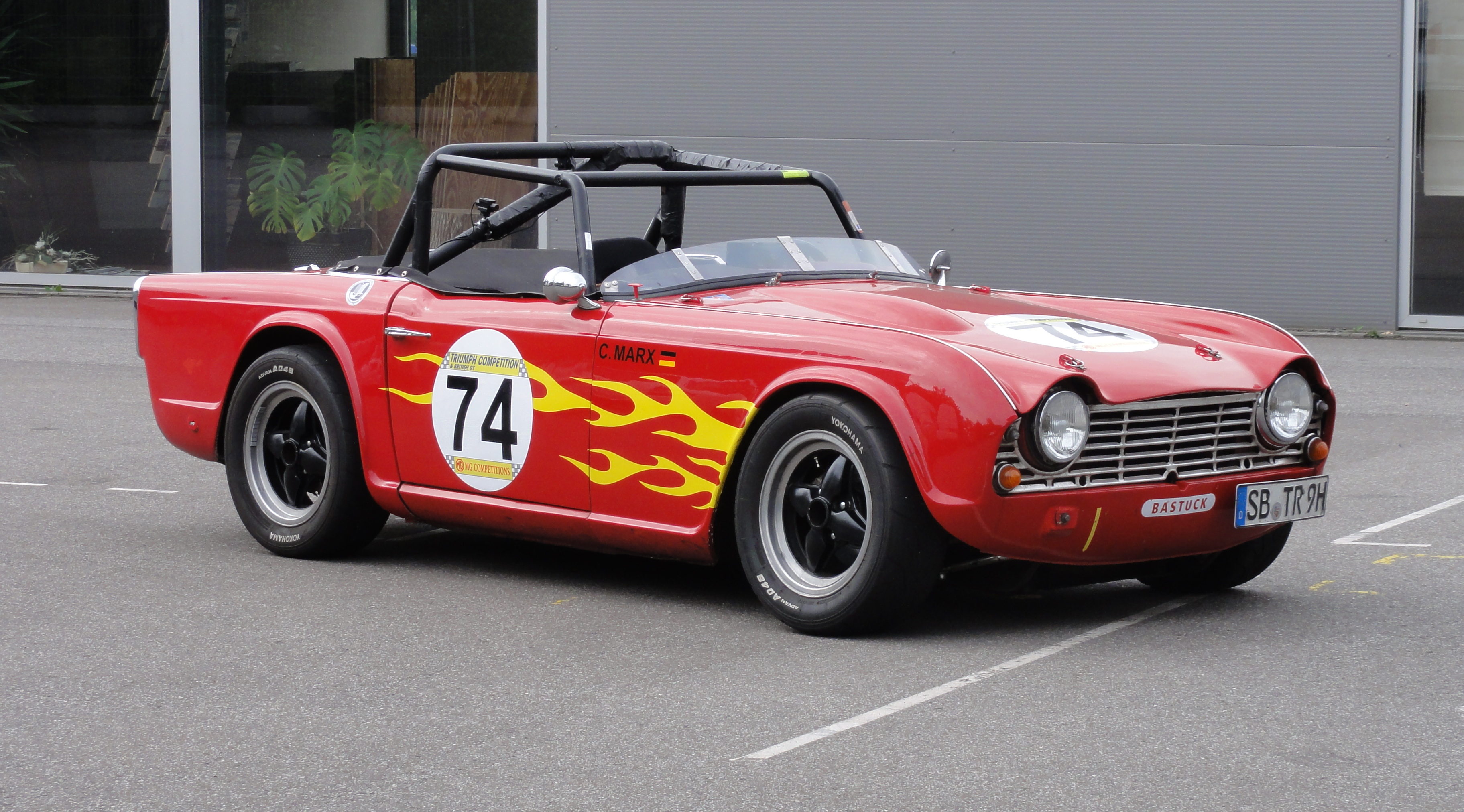 Triumph TR 4 Rennwagen, offene Version, Überrollkäfig